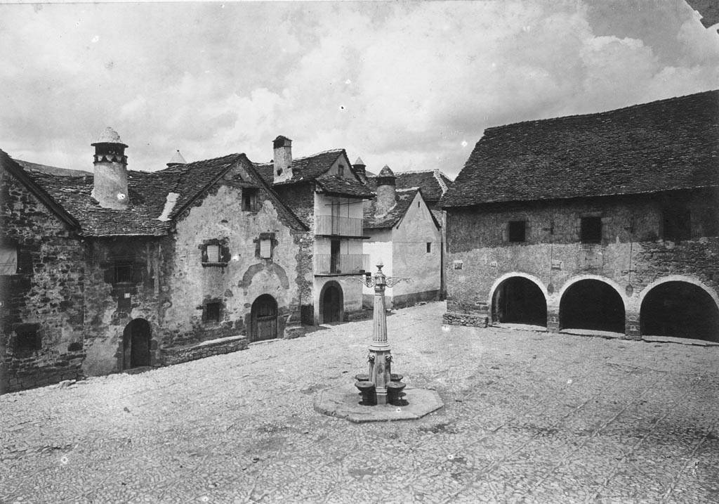 Plaça Major d'Ansó amb una font al centre. Juli Soler i Santaló (Entre 1890 i 1914)